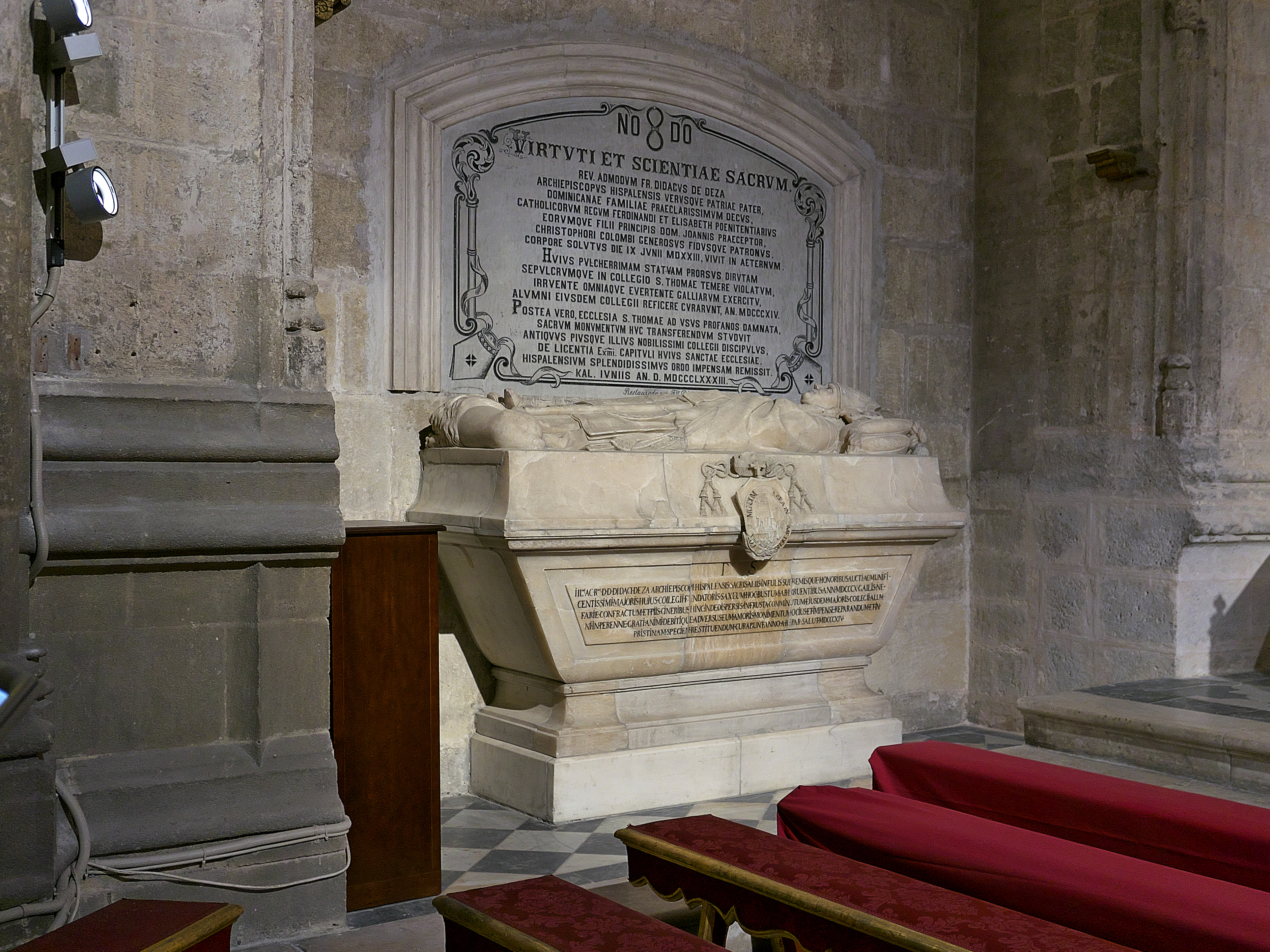 Capilla de San Pedro (Catedral de Sevilla). Diego de Deza, siendo arzobispo de Sevilla, falleció (1523) en el Monasterio de San Jerónimo de Buenavista. Sus restos fueron trasladados a un sepulcro en el Colegio de Santo Tomás (Sevilla), expoliado y destruido por la francesada. Sustituido por otro de mármol vacío, que fue trasladado (1884) a la Catedral de Sevilla.